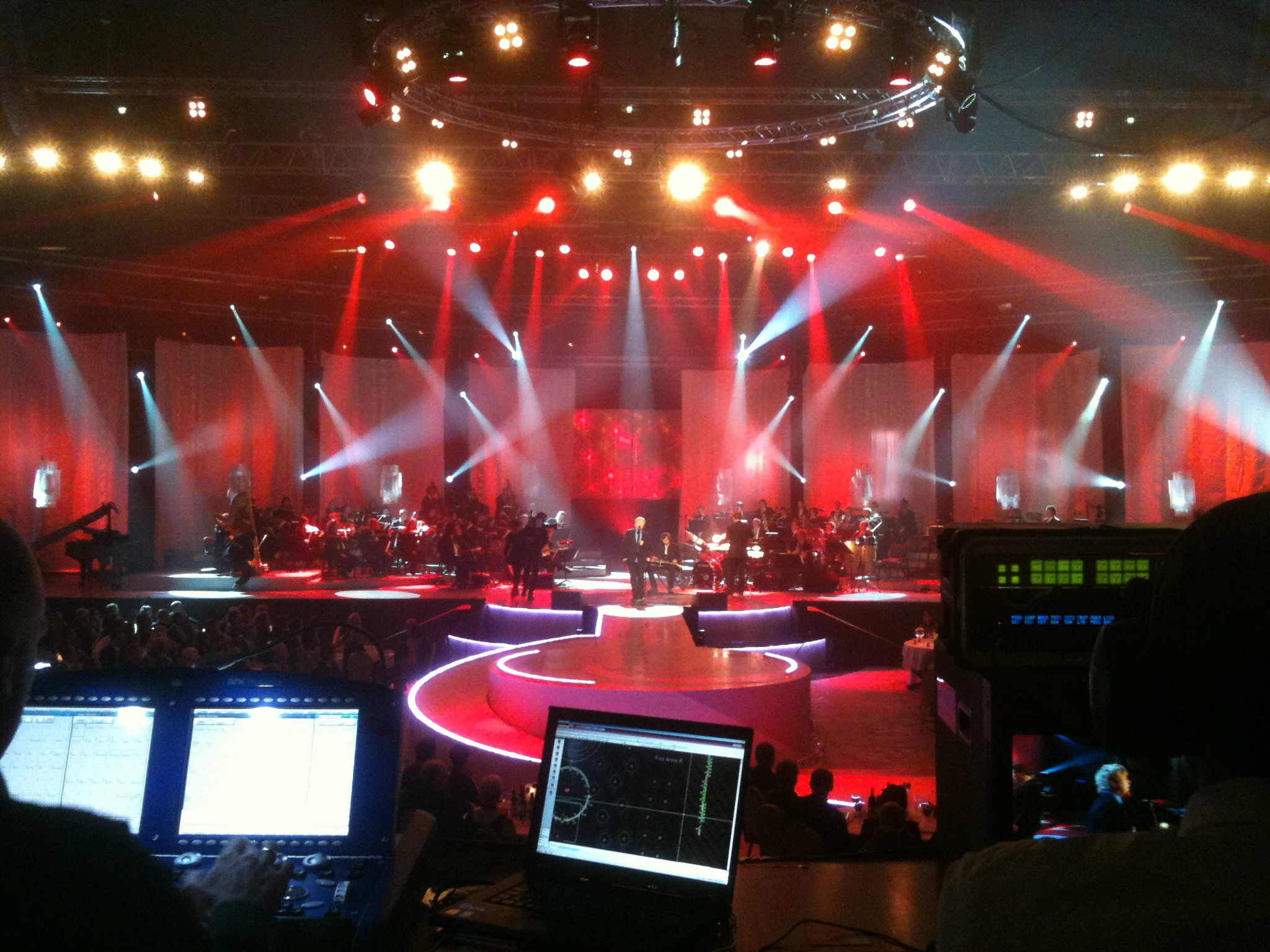 Idrettsgalla 2010, KORK + Kurt Nilsen 2